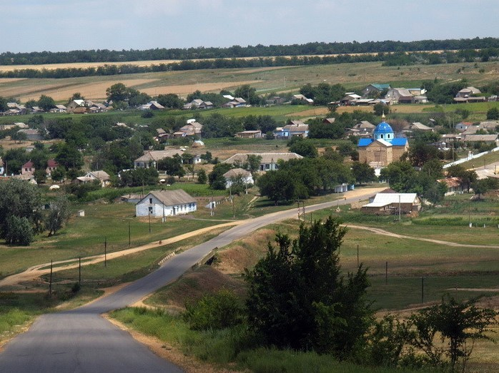 Новоукраинка